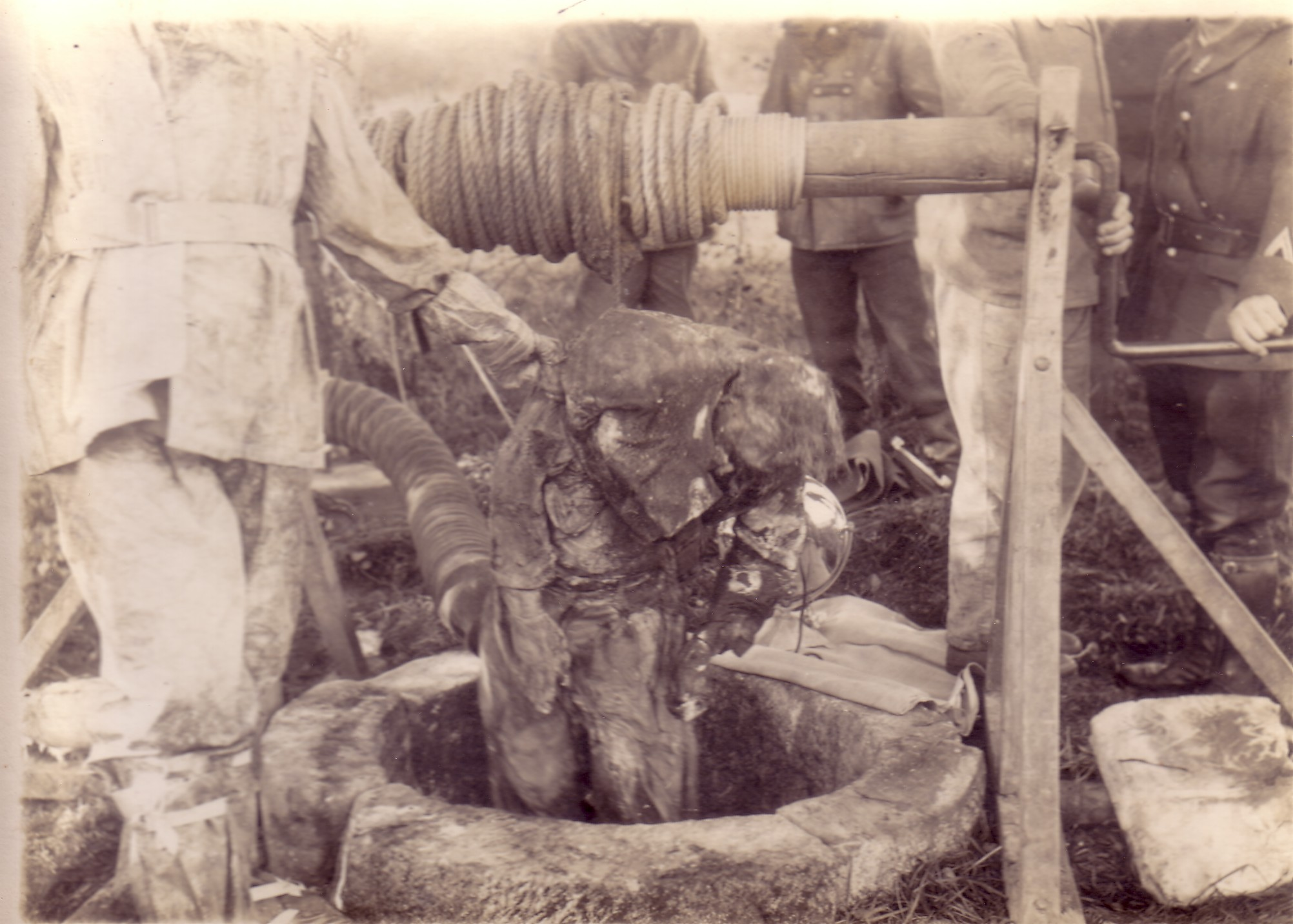 La remontée des corps des victims du massacre du puits de Guerry